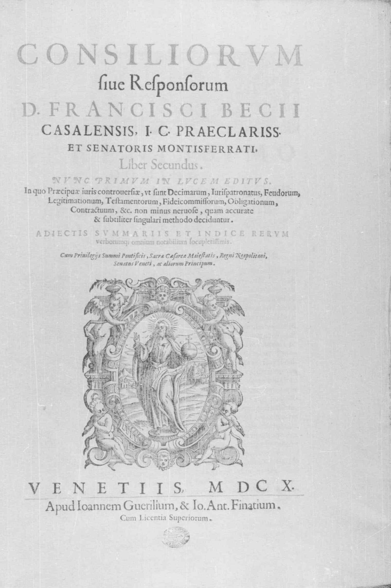 Frontespizio